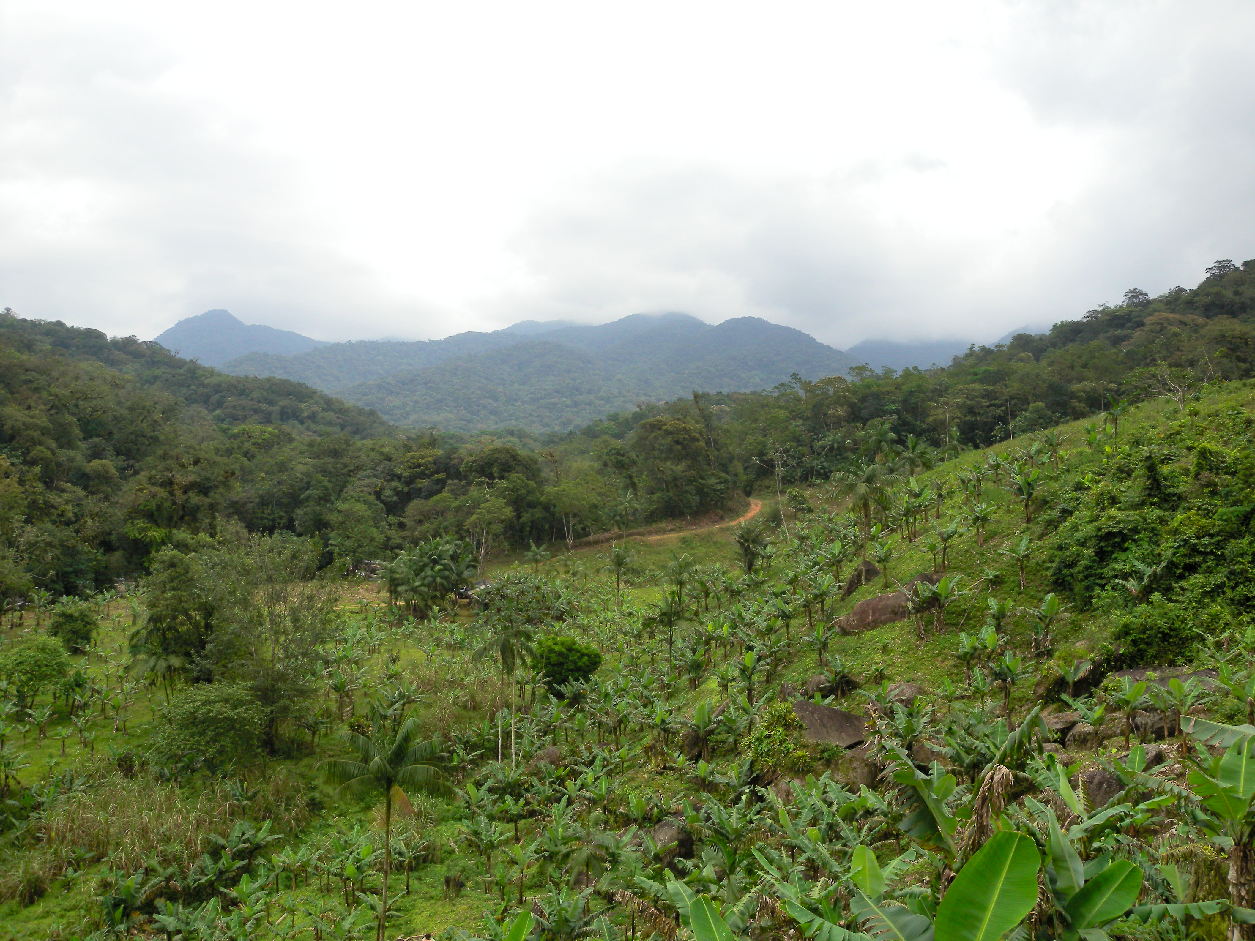 saibadela